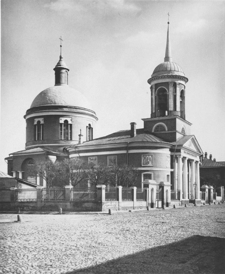 Храм Иверской иконы Божьей Матери на Всполье